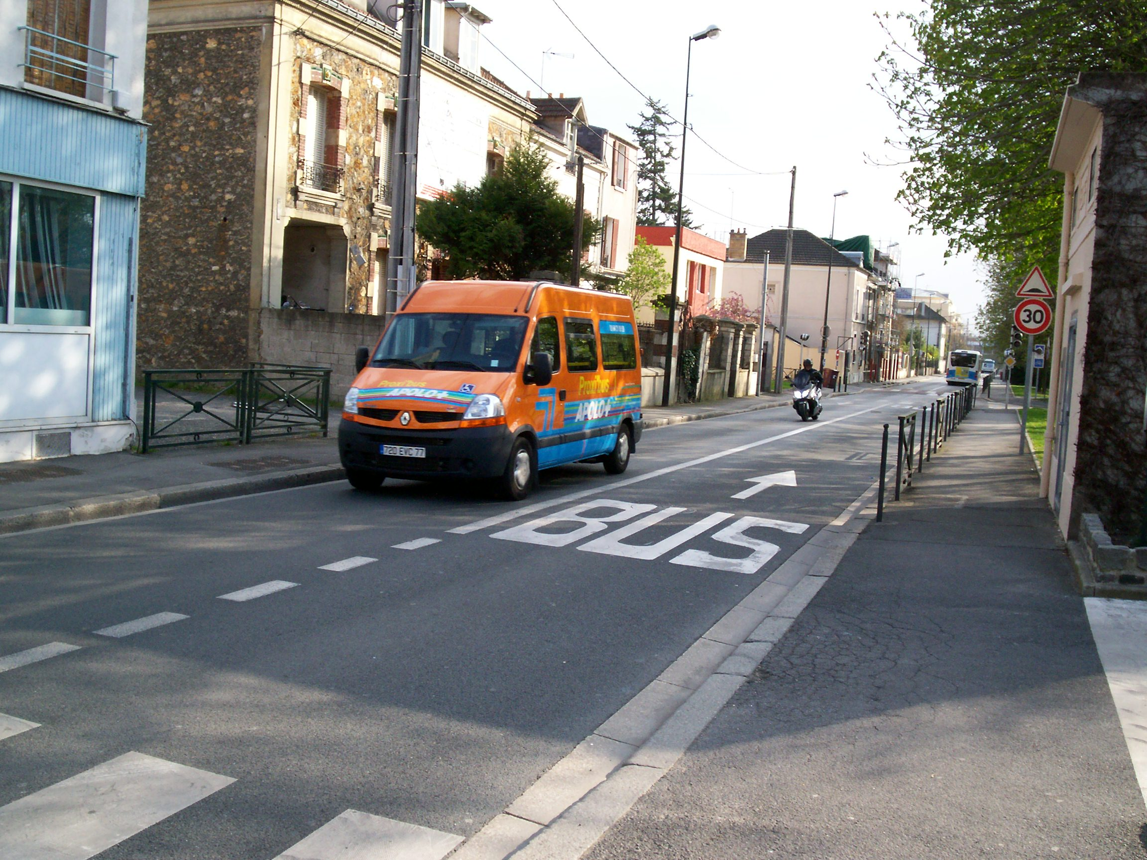 Véhicule Apolo+